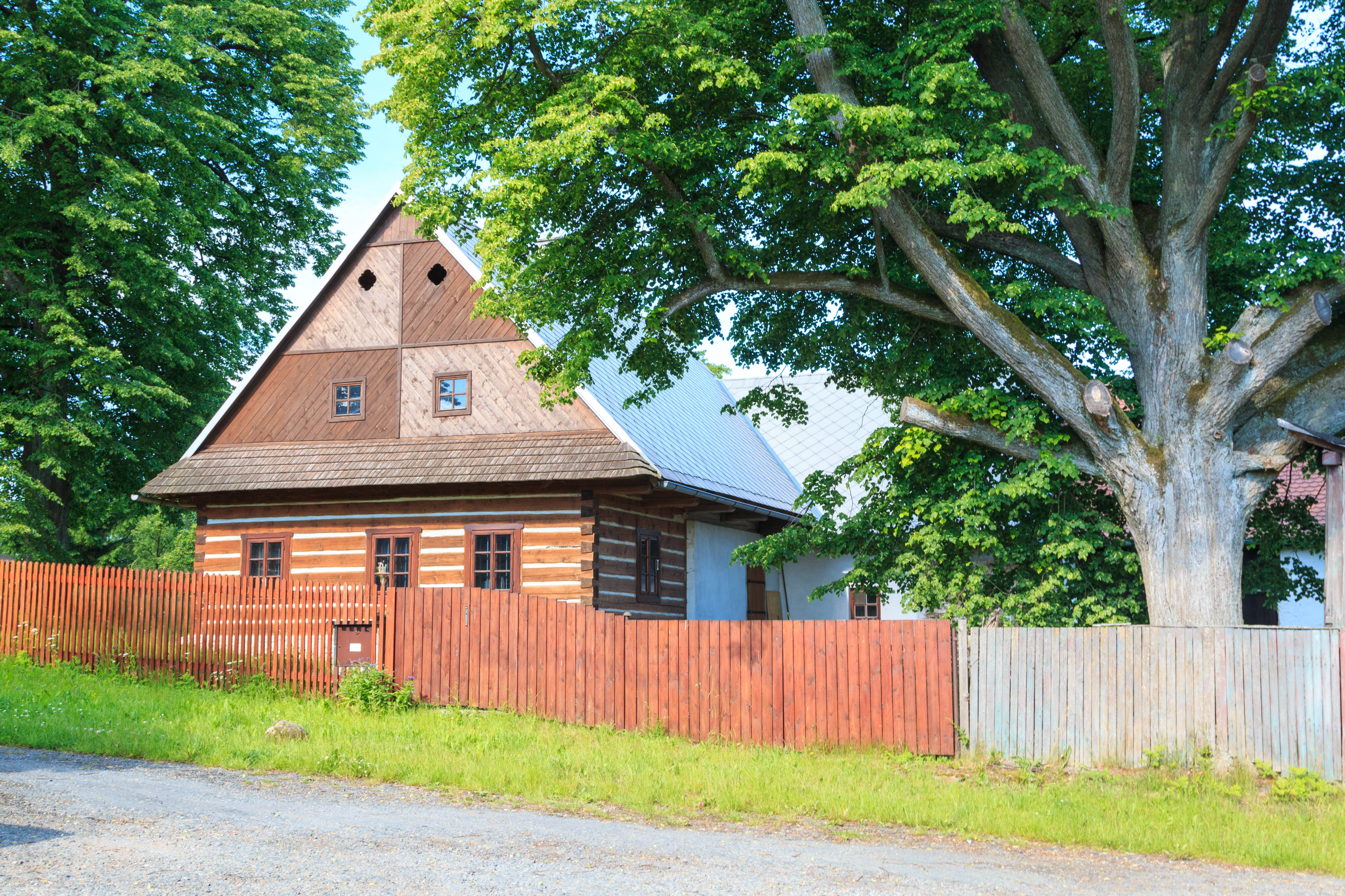 Lhoty u Vortové čp. 18